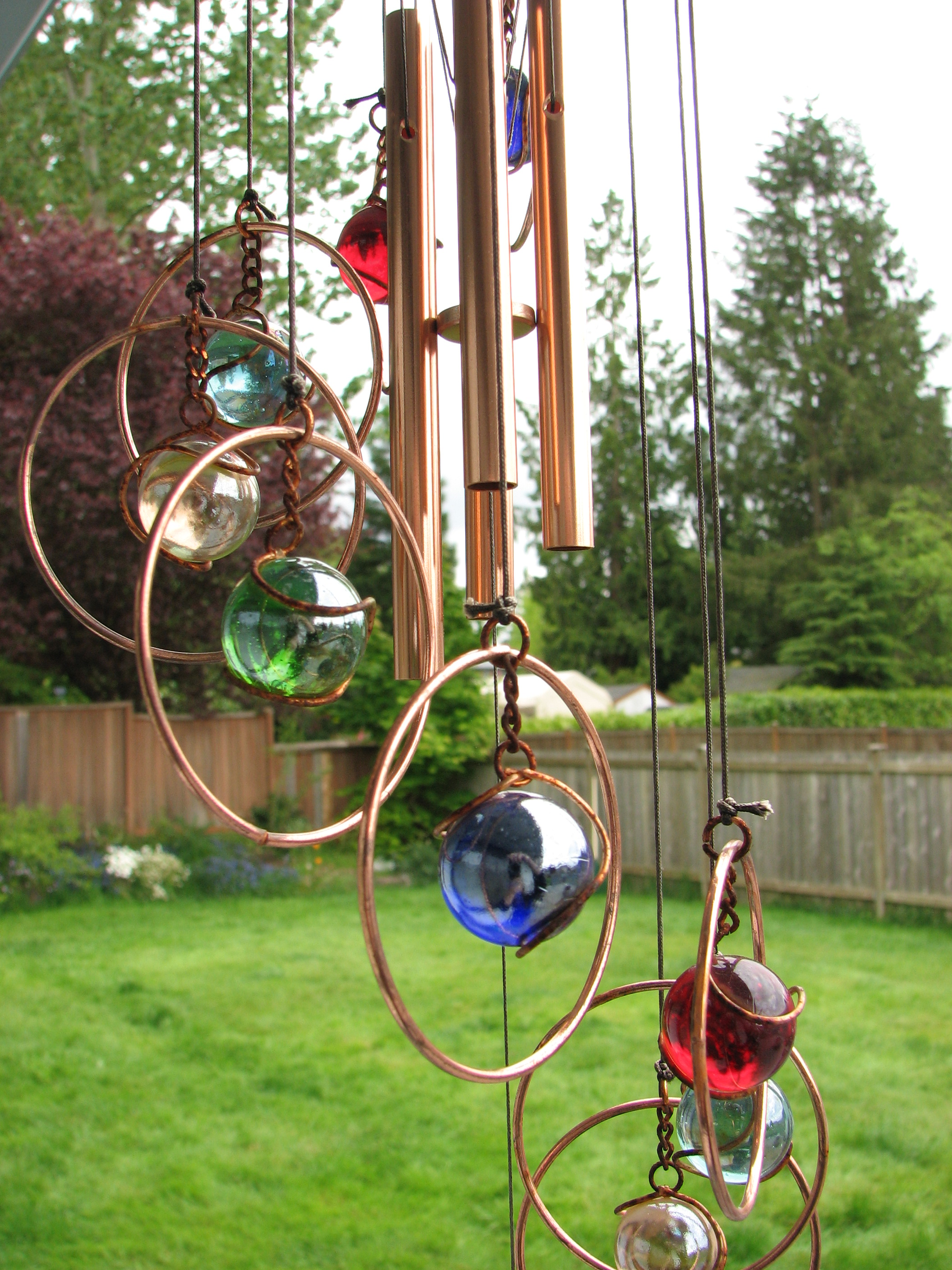 Wind chimes.